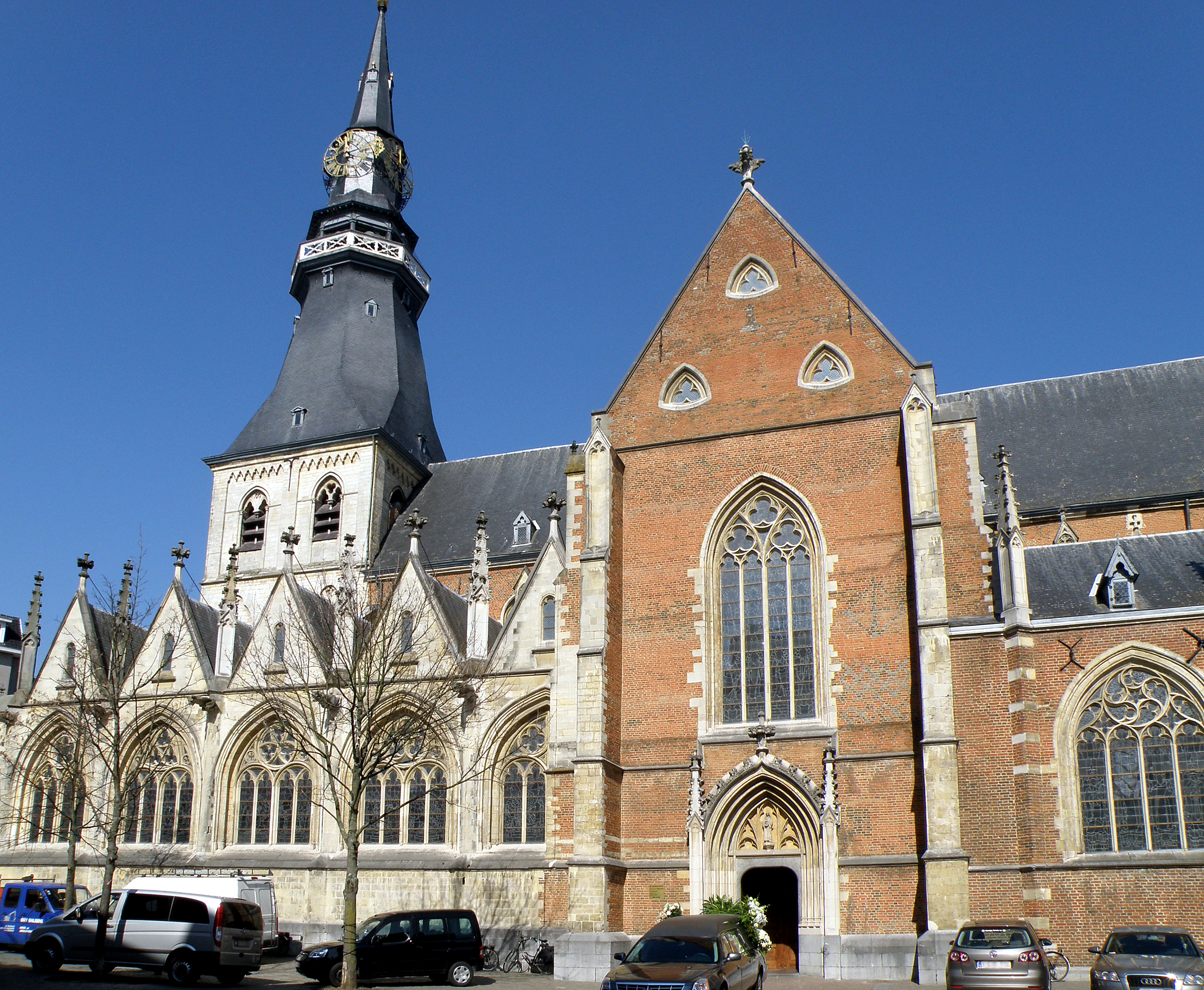 Hasselt (prov. Limburg, België). Sint-Quintinuskathedraal, zuidel. flank.